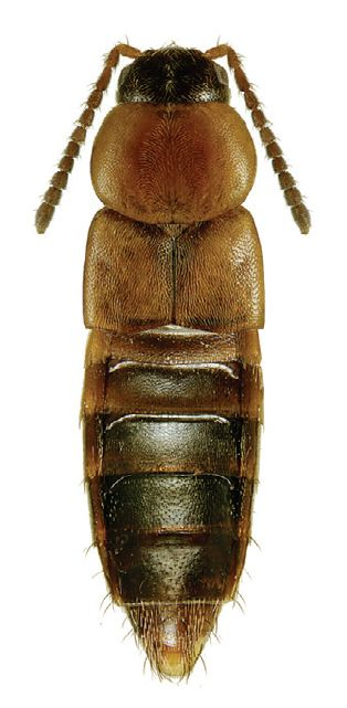 Lypoglossa franclemonti